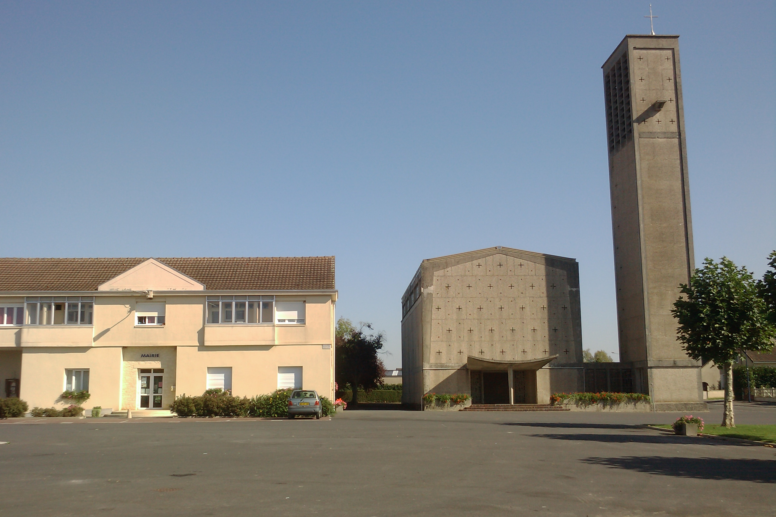 église et mairie du nouveau bourg de Graignes